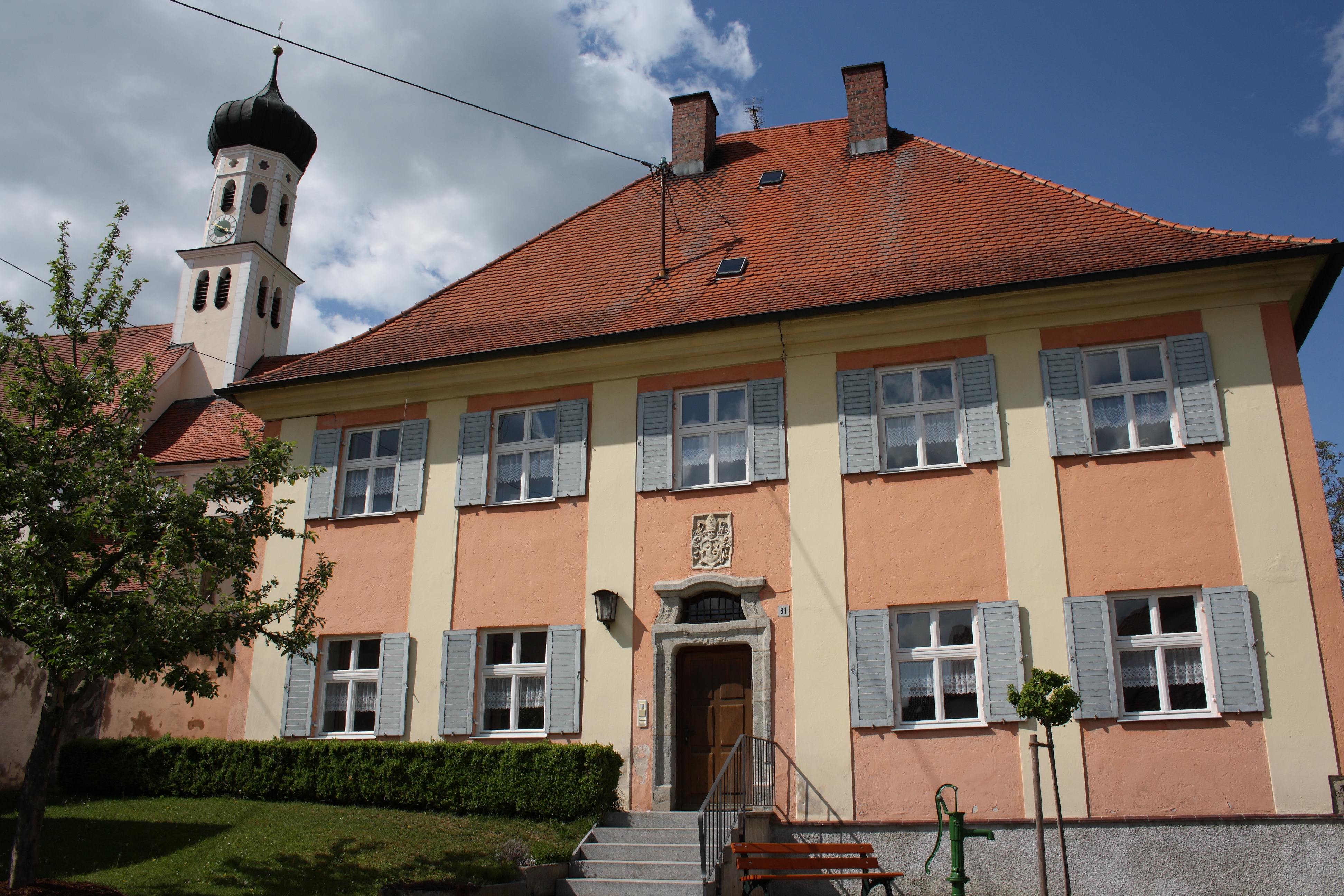 katholisches Pfarrhaus in Wörnitzstein, erbaut 1741 wohl von Johann Georg Hitzelberger, Graf-Hartmann-Straße 31